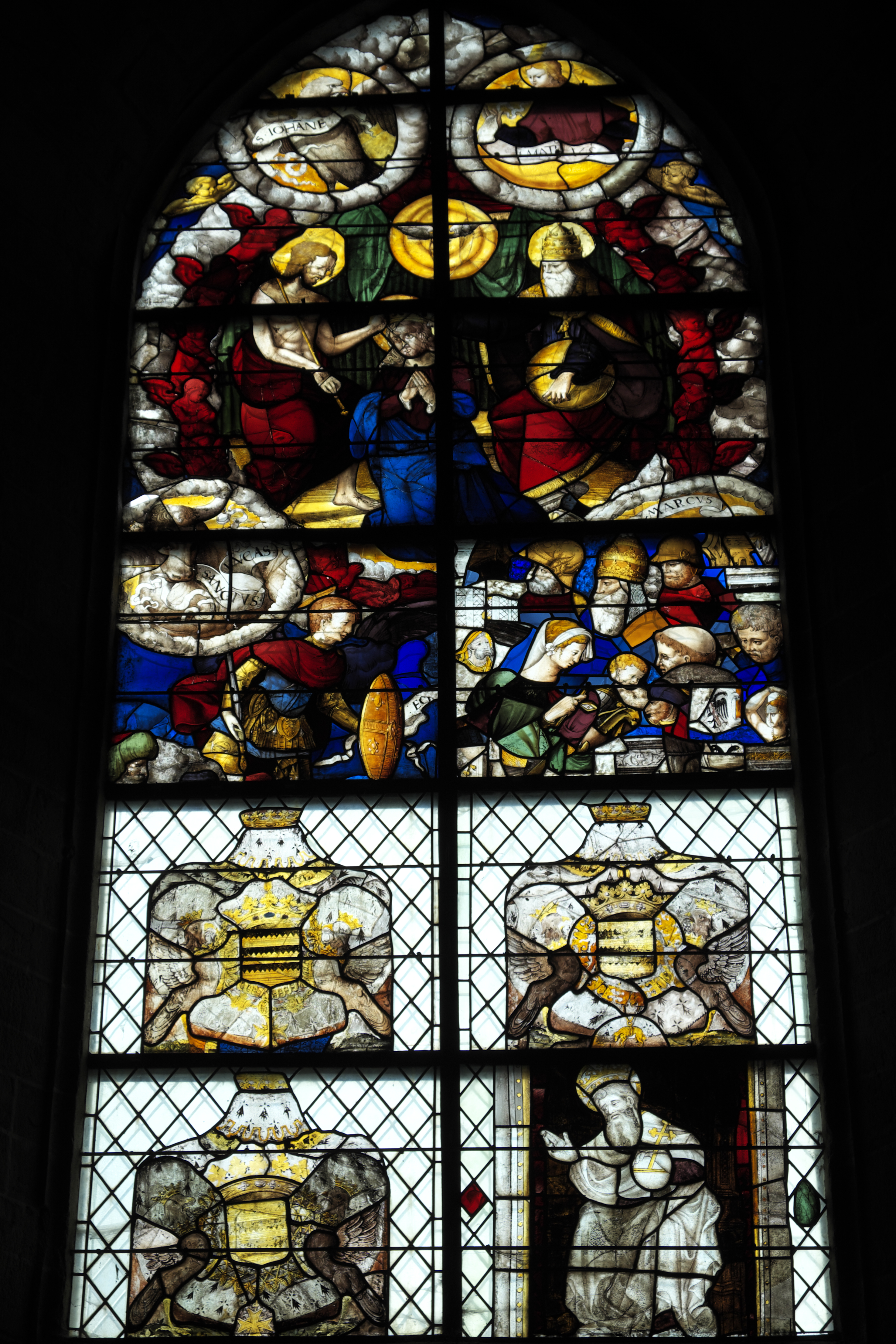 Basilika Notre-Dame-de-l'Assomption in La Guerche-de-Bretagne im Département Ille-et-Vilaine (Bretagne/Frankreich), Bleiglasfenster (Baie 10) mit Fragmenten aus dem 15., 16. und 17. Jahrhundert; Darstellung: Marienkrönung; unten: Wappen